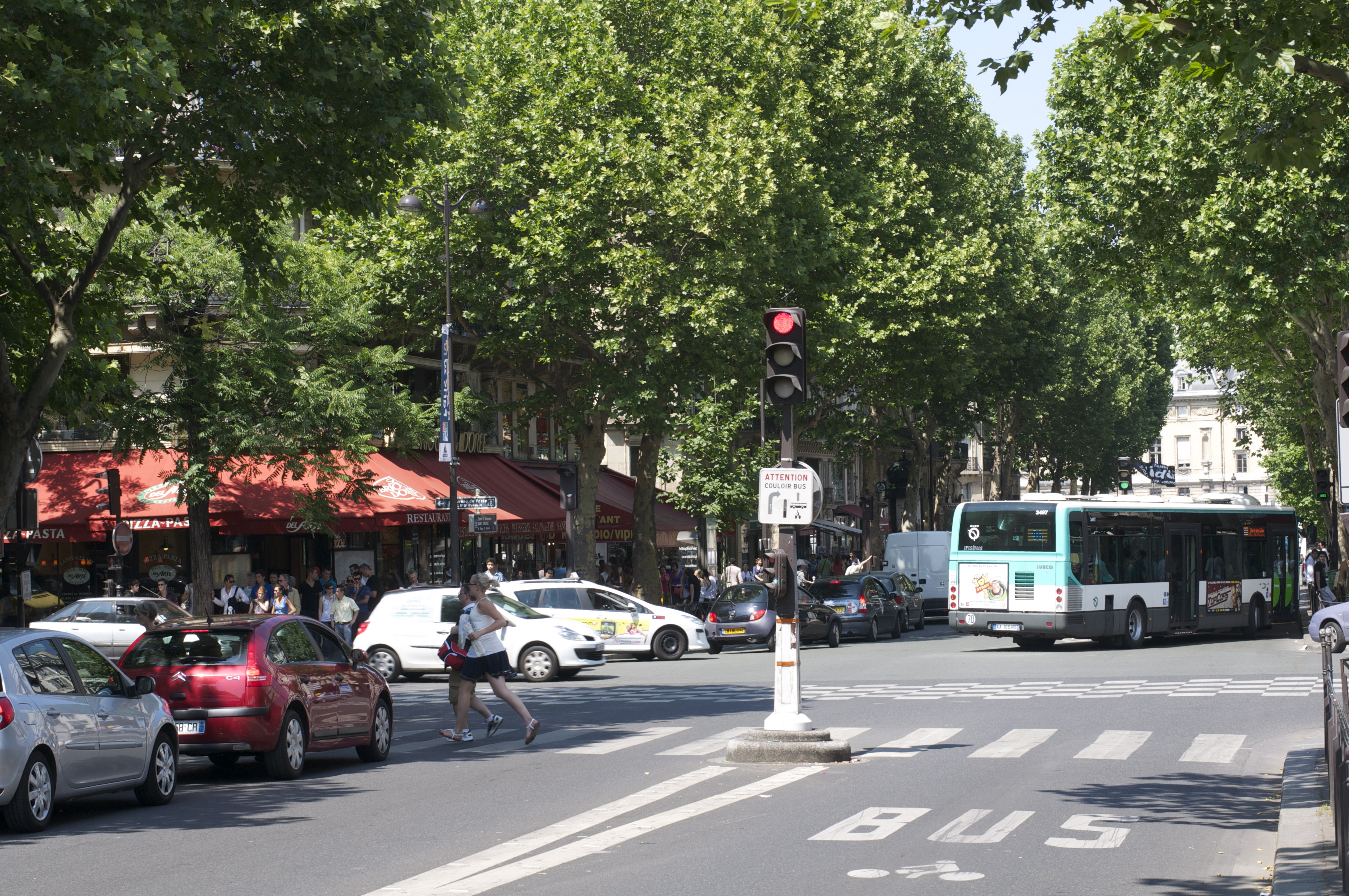 Boulevard Saint-Germain / Boulevard Saint-Michel, Paris.